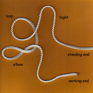 Knot components